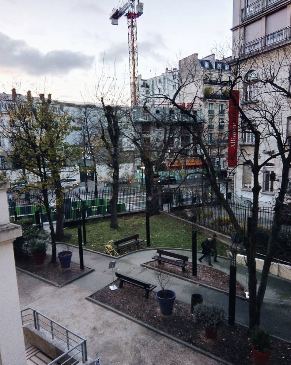 Edificio del 105 Boulevard Raspail